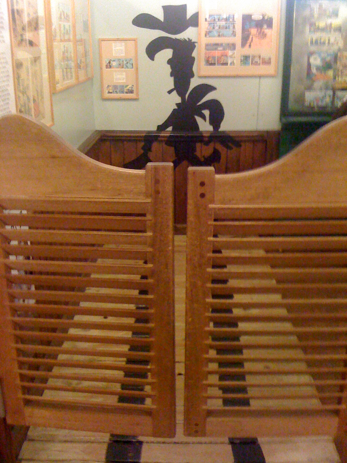 L'ombre de Lucky-Luke au centre belge de la bande dessinée, Bruxelles, Belgique.